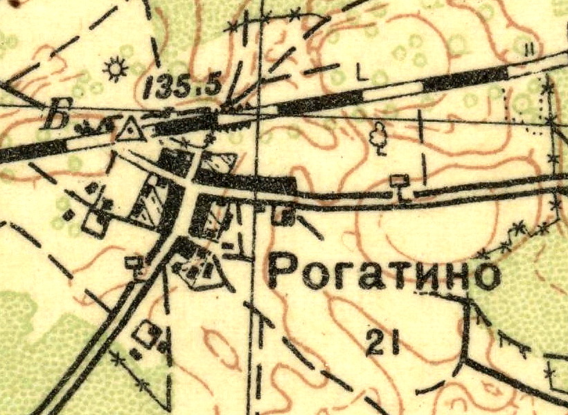 Топографическая карта Ленинградской области, квадрат О-35-23-Г (Волосово), деревня Рогатино